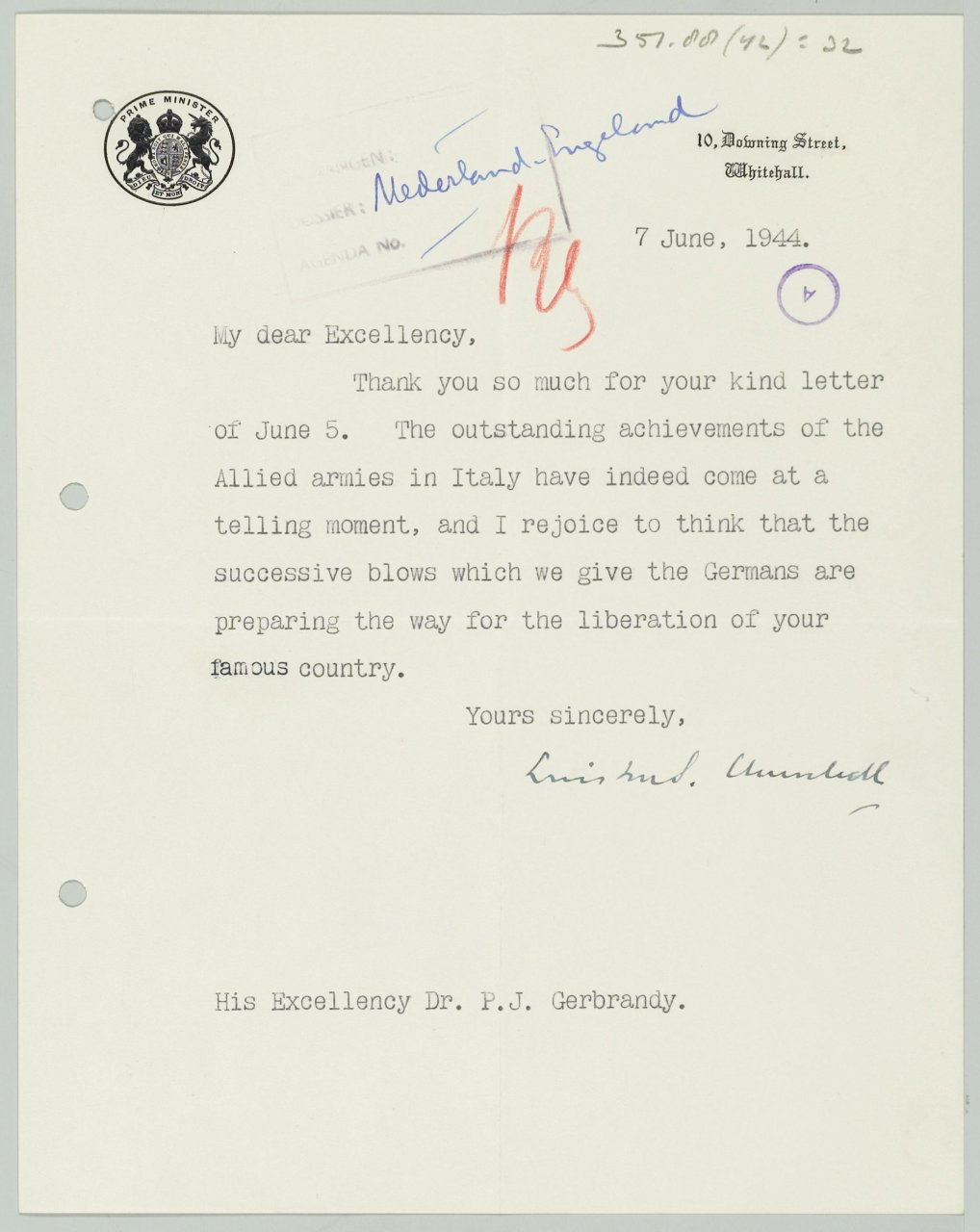 Brief van Churchill aan Gerbrandy (7 juni 1944). Bijschrift van Erfgoed in Beeld op Flickr: "Het is opmerkelijk dat Churchill wel schrijft over de geallieerde opmars in Italië, maar niet over de invasie in Normandië, die een dag eerder was begonnen. / Het Gerbrandy-monument herinnert de inwoners van Sneek aan de Fries die van 1940 tot 1945 minister-president van het Londens kabinet was. Dit leverde hem de bijnaam 'Kleine Churchill' op." [Voor het Gerbrandy-monument zie bijvoorbeeld (File:Sneek14.JPG.]Tekst (merk op dat voor Gerbrandy de initialen "P.J." worden gebruikt):] 10 Downing Street, Whitehall 7 June, 1944. My dear Excellency, Thank you so much for your kind letter of June 5. The outstanding achievements of the Allied armies in Italy have indeed come at a telling moment, and I rejoice to think that the successive blows which we give the Germans are preparing the way for the liberation of your famous country. Yours sincerely, Winston S. Churchill His Excellency Dr. P.J. Gerbrandy.